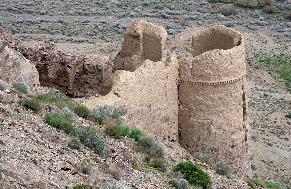 قلعه سارو (جنوبی)